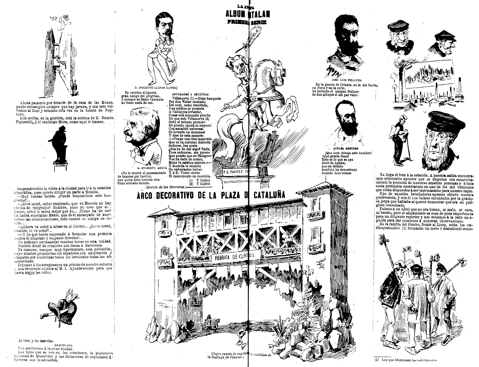 «Álbum catalán, primera serie», en la revista satírica española La Avispa.